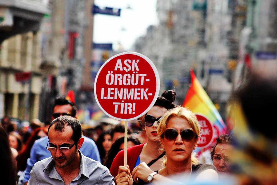 LGBT Onur Haftası, 21. LGBT Onur Yürüyüşü, 2013, Taksim, İstanbul.